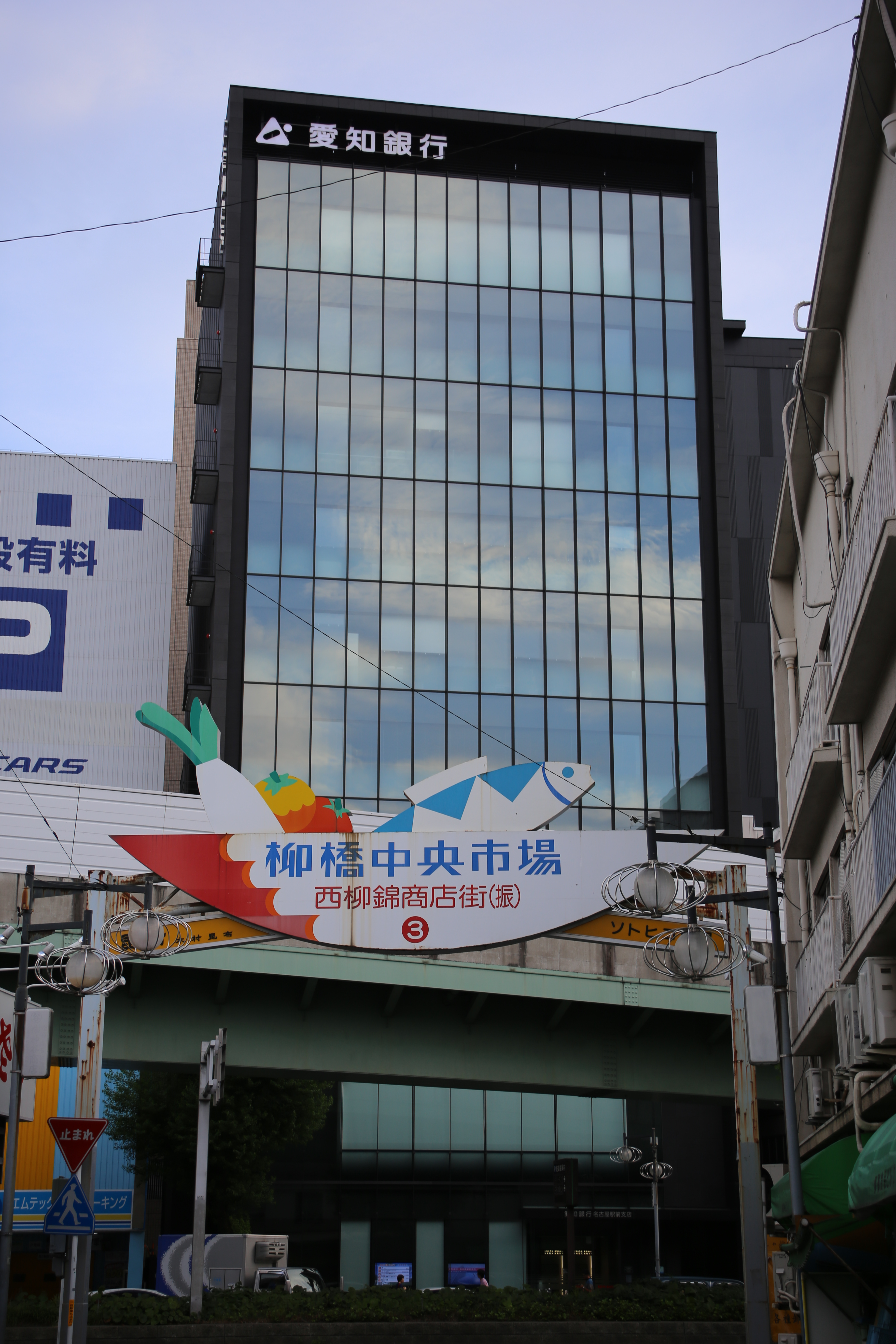 名古屋市中村区名駅四丁目の愛知銀行名古屋駅前ビルを北側公道より撮影